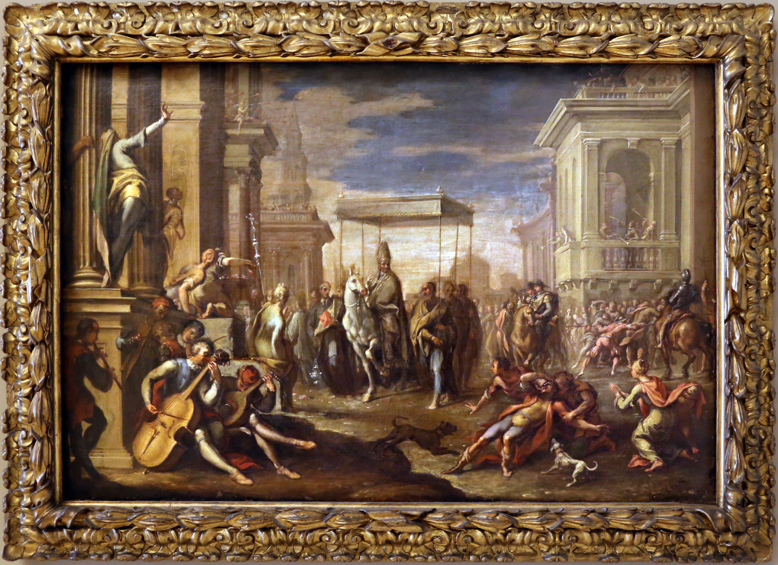 Palazzo dei Musei (Modena) This is a photo of a monument which is part of cultural heritage of Italy.